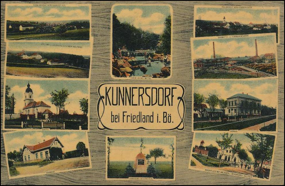 Kunratice u Frýdlantu v roce 1911.